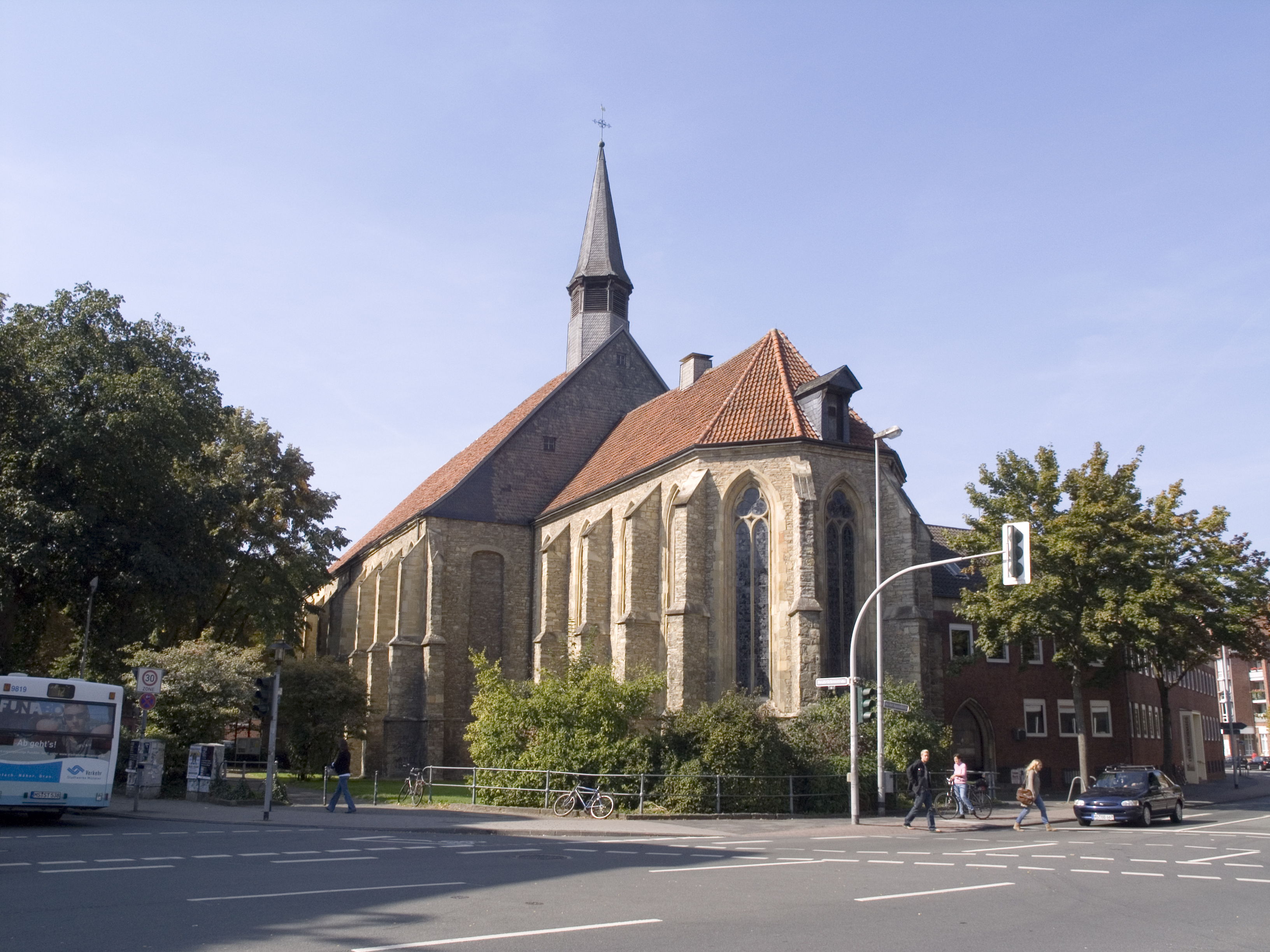 Северный Рейн - Вестфалия, Мюнстер - Апостольская церковь